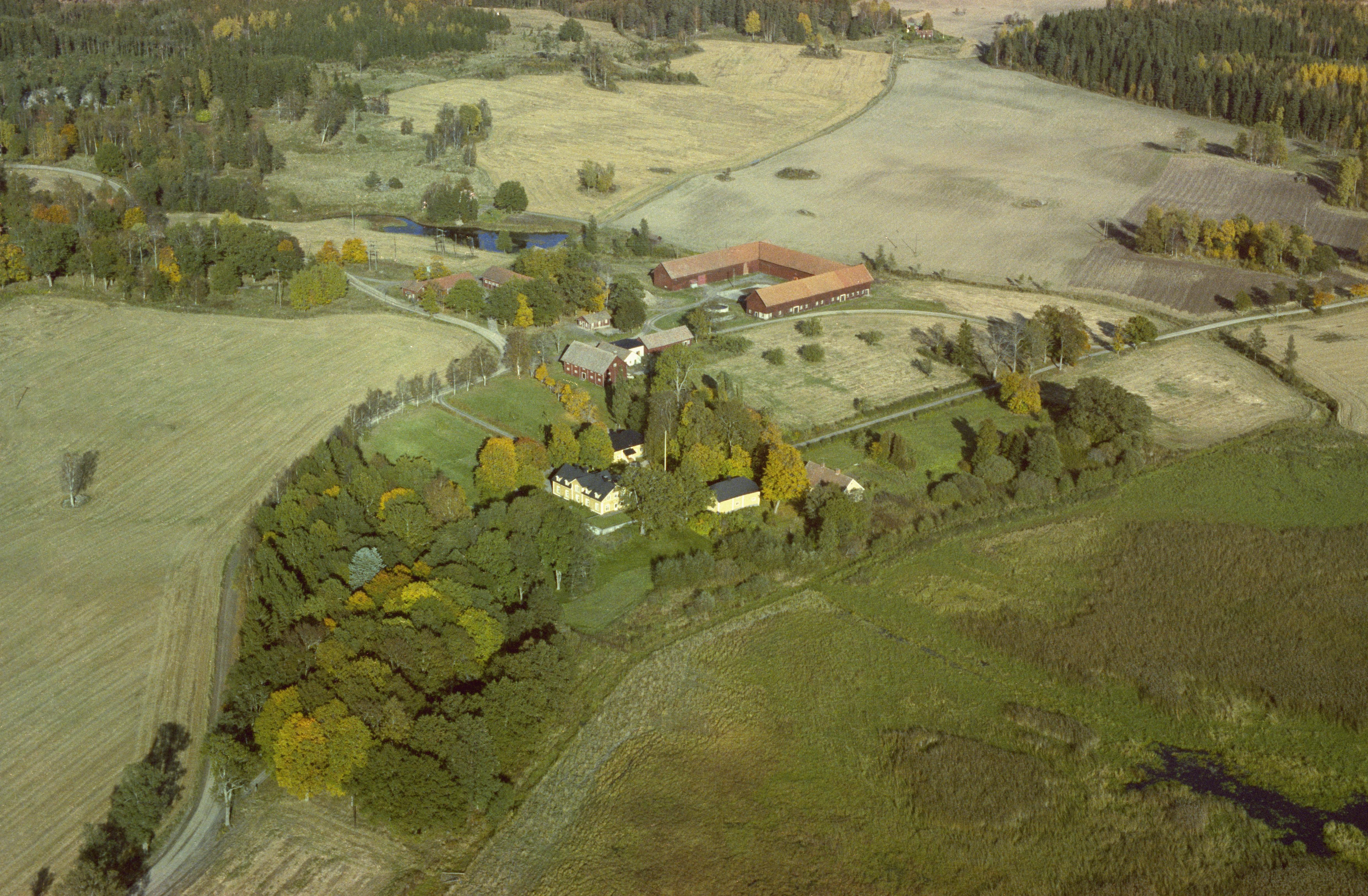 Abbotsnäs herrgård (skrivs även Abbotnäs). Bilden är tagen mot (väderstreck): NO Motiv: Abbotsnäs Nyckelord: Flygbilder, Riksintressen Kategori: Herrgårds-/slottslandskap Abbotsnäs herrgård (skrivs även Abbotnäs). Bilden är tagen mot (väderstreck): NO.